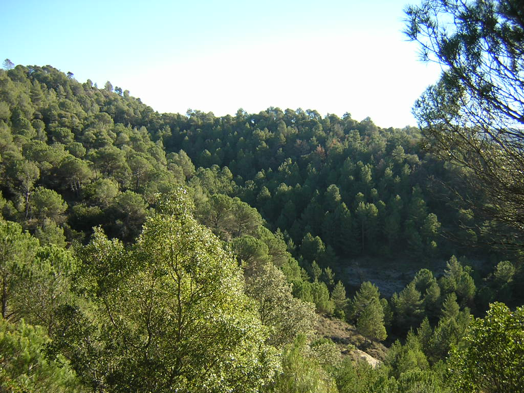 El Bac del Coix (Monistrol de Calders, Moianès)